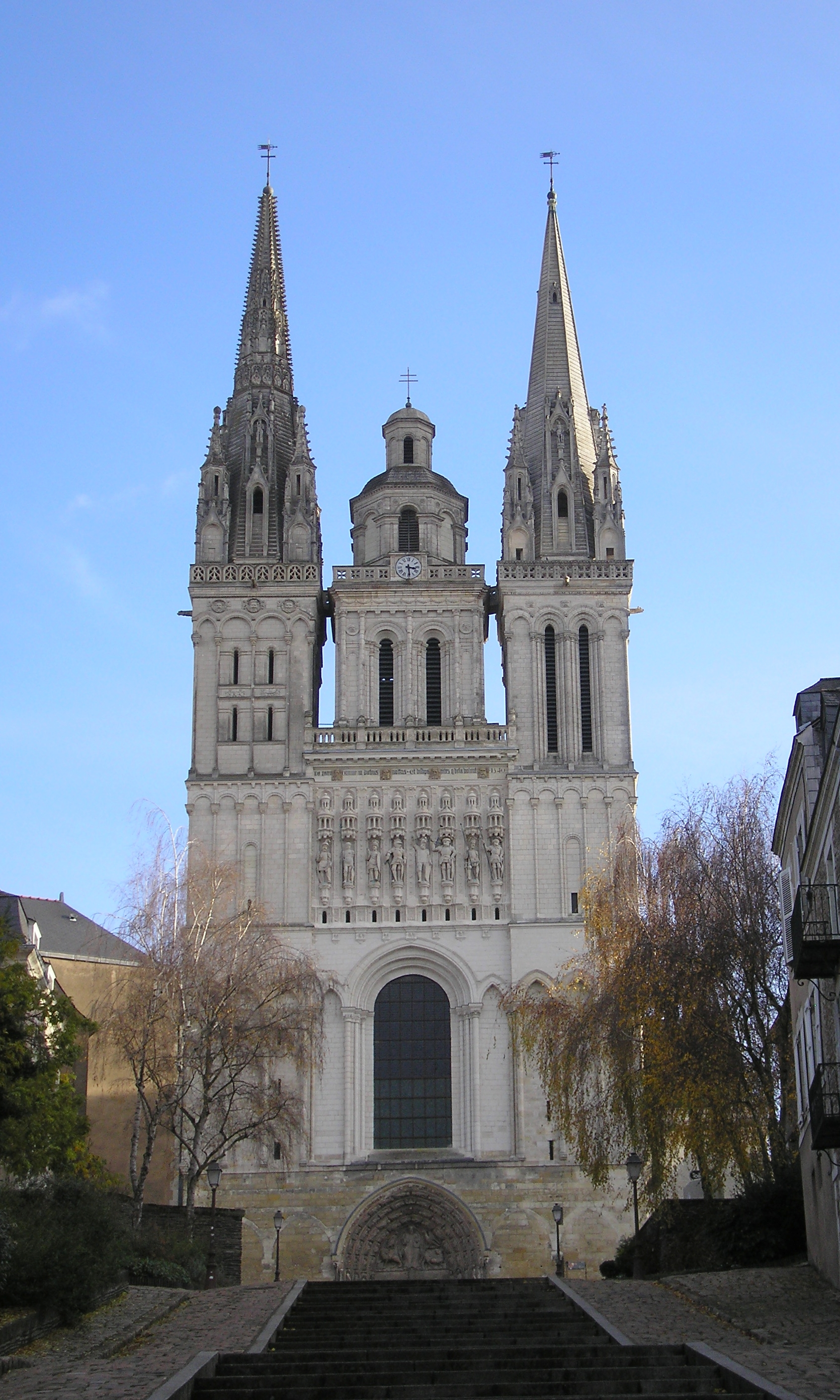 Angers (Pays-de-Loire, France). Le haut de la façade de la cathédrale Saint-Maurice.